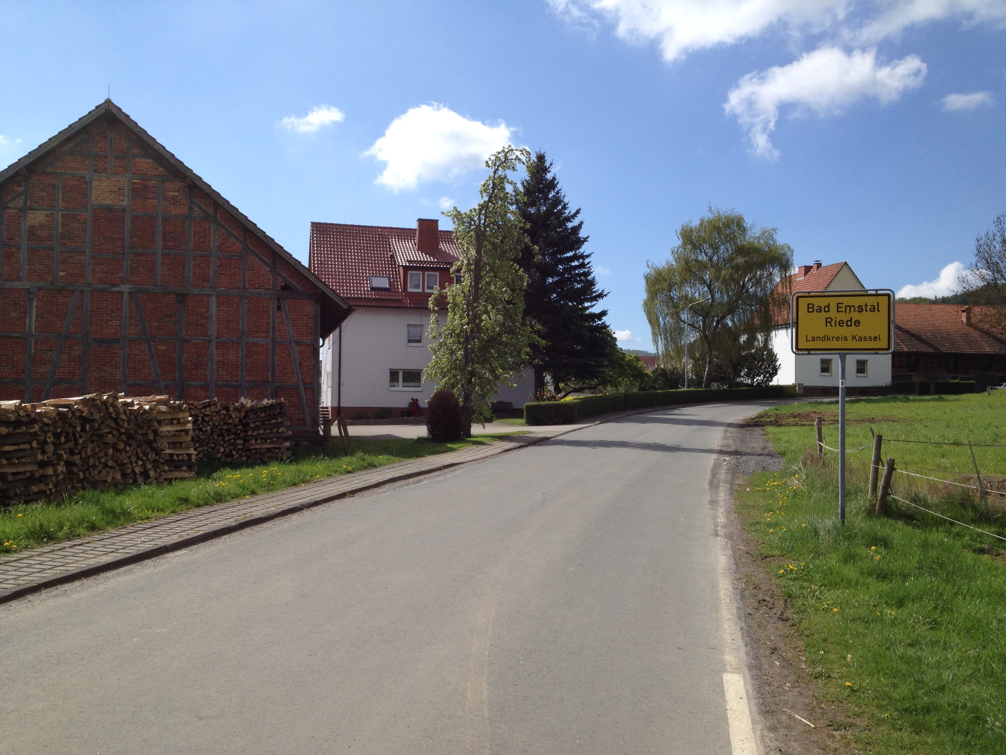 Die Elbenberger Straße (Kreisstraße 111) in Riede, einem Ortsteil von Bad Emstal.